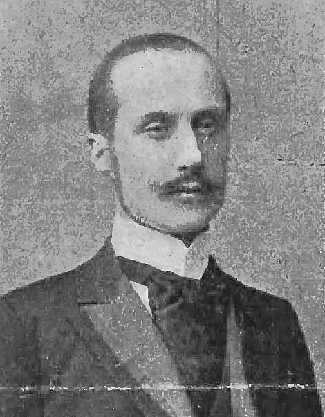 Mikołaj Hlibowicki (-1907)